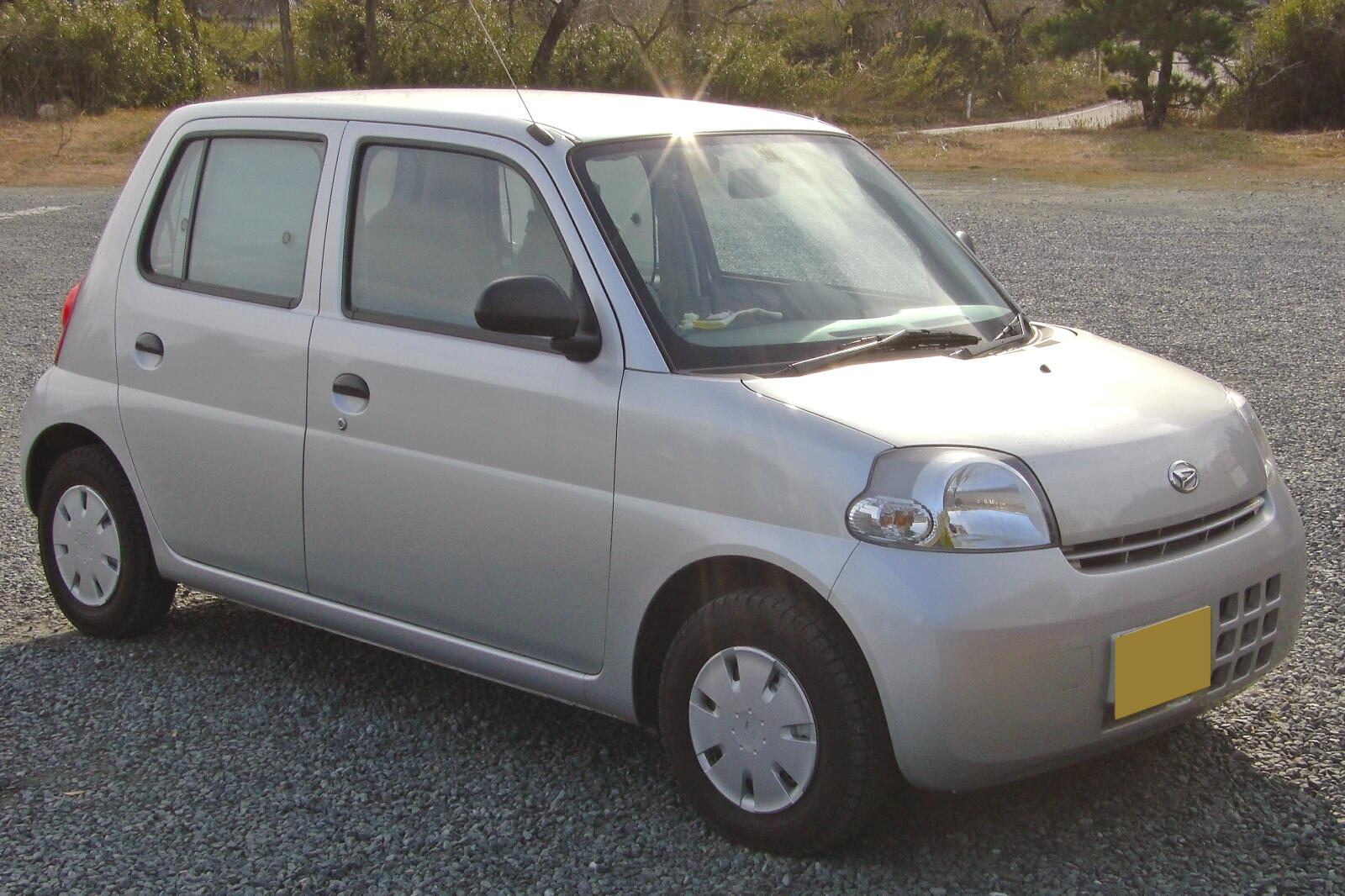 ダイハツ・エッセ